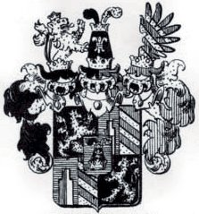 Welser (von Welsersheimb) (Adelsgeschlecht), nach Siebmacher